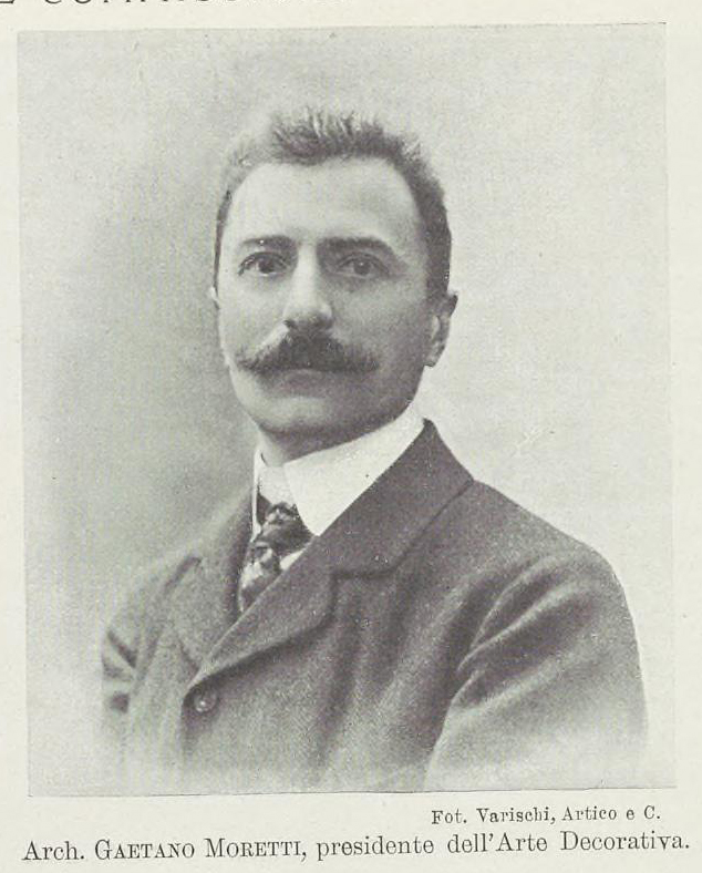 Arch. Gaetano Moretti (1860-1938)